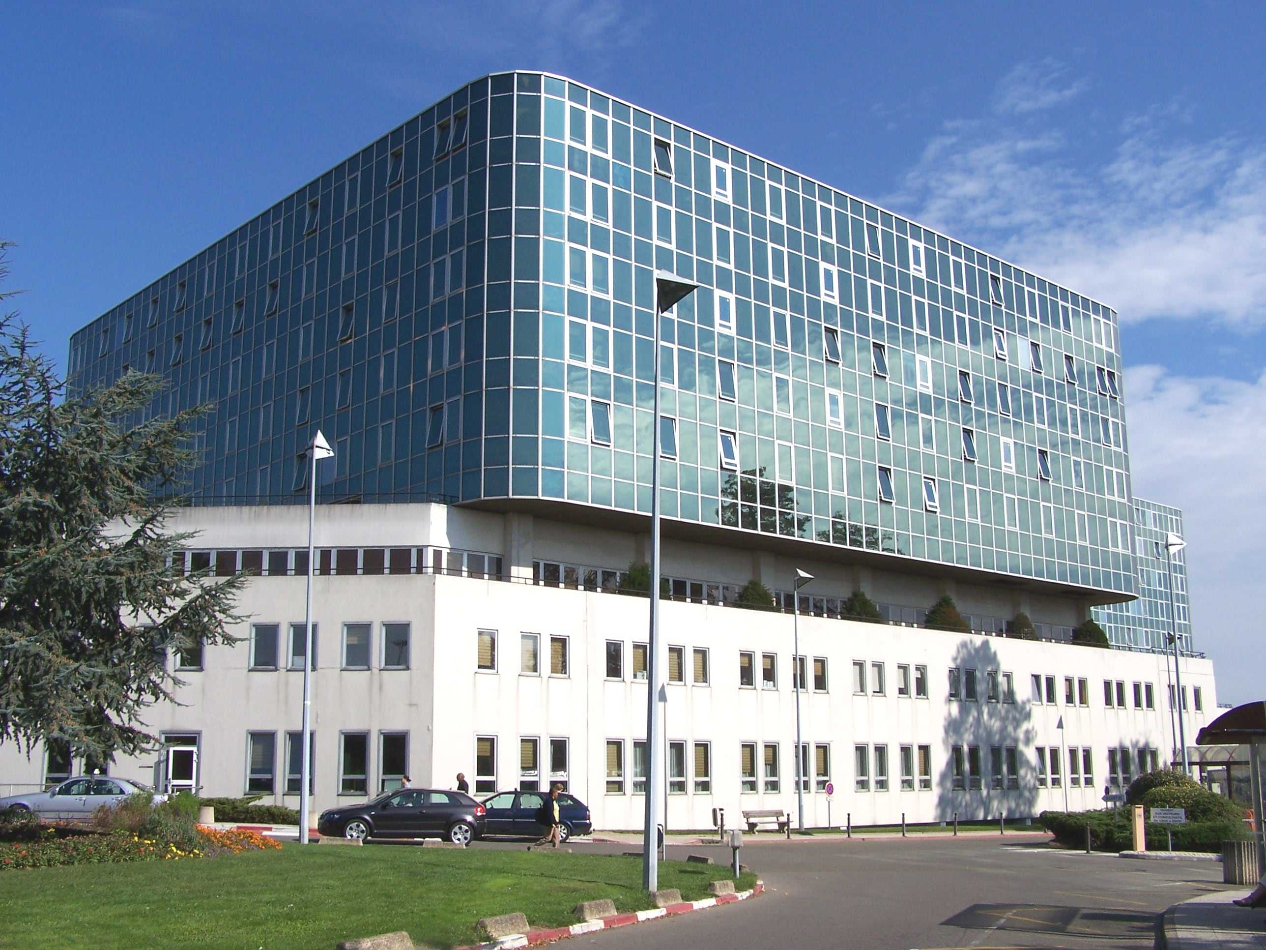 Centre hospitalier de Versailles André Mignot, au Chesnay (Yvelines, France)